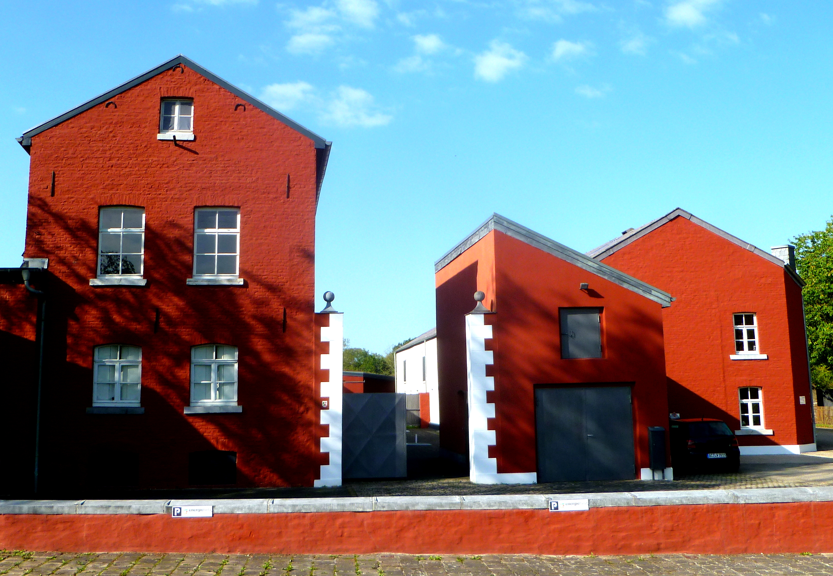 Komericher Mühle in Aachen-Brand